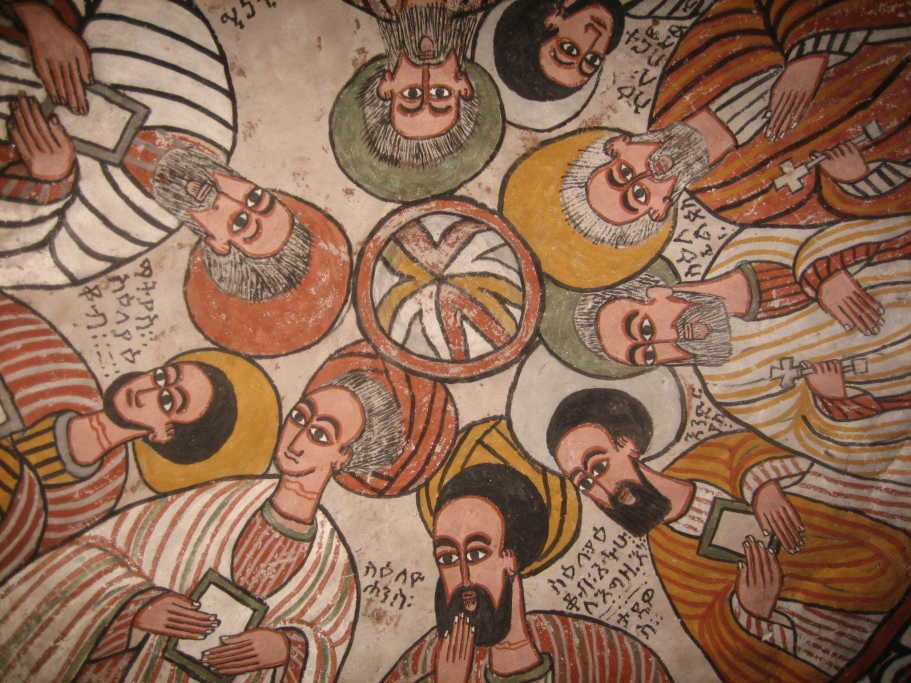 Fresques de l'église d'Abuna Yemata Guh (Gheralta, Ethiopie)